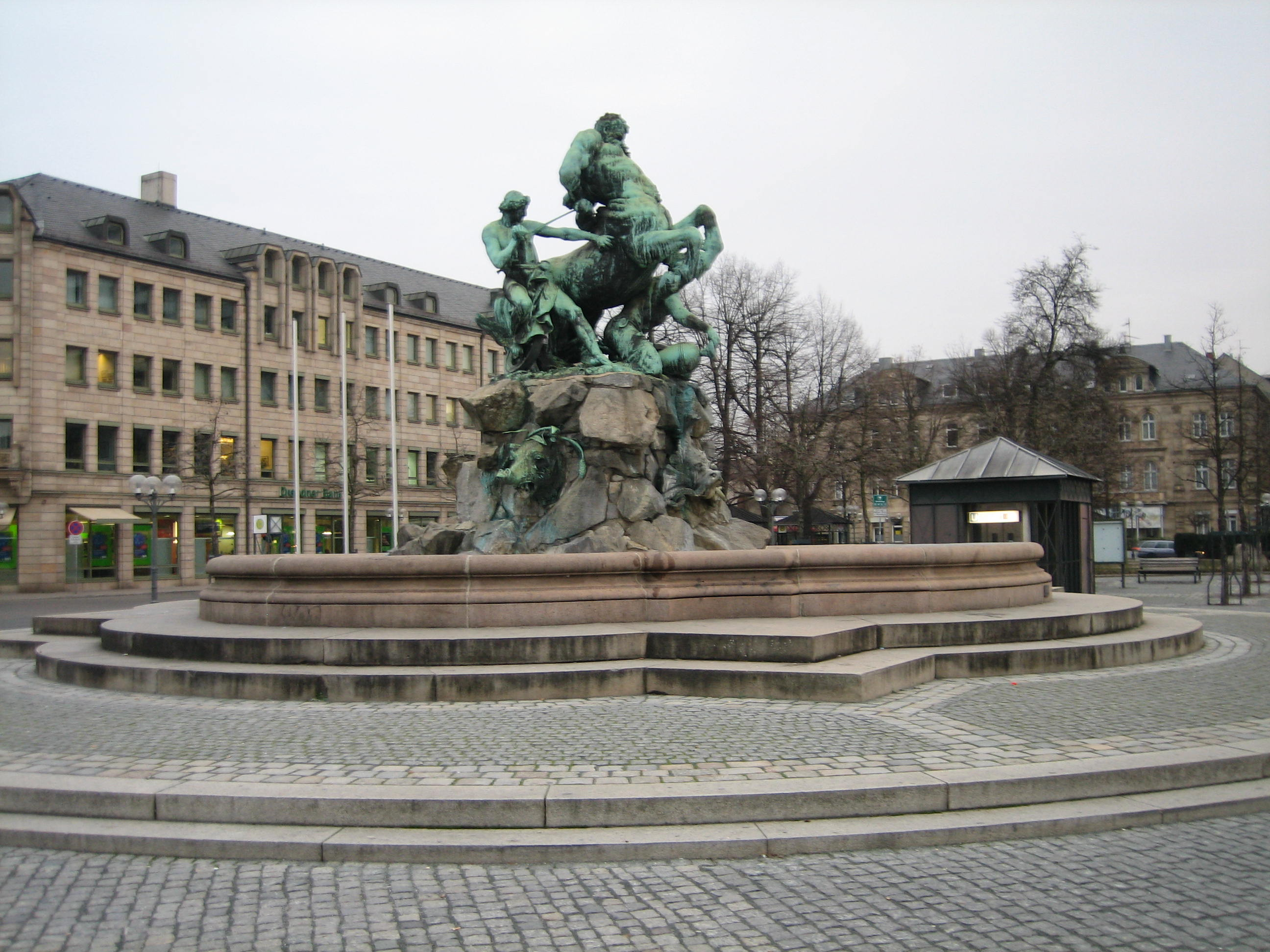 Fürth Bahnhofsplatz: Centaurenbrunnen, sculpted by Rudolf Maison, 1890.